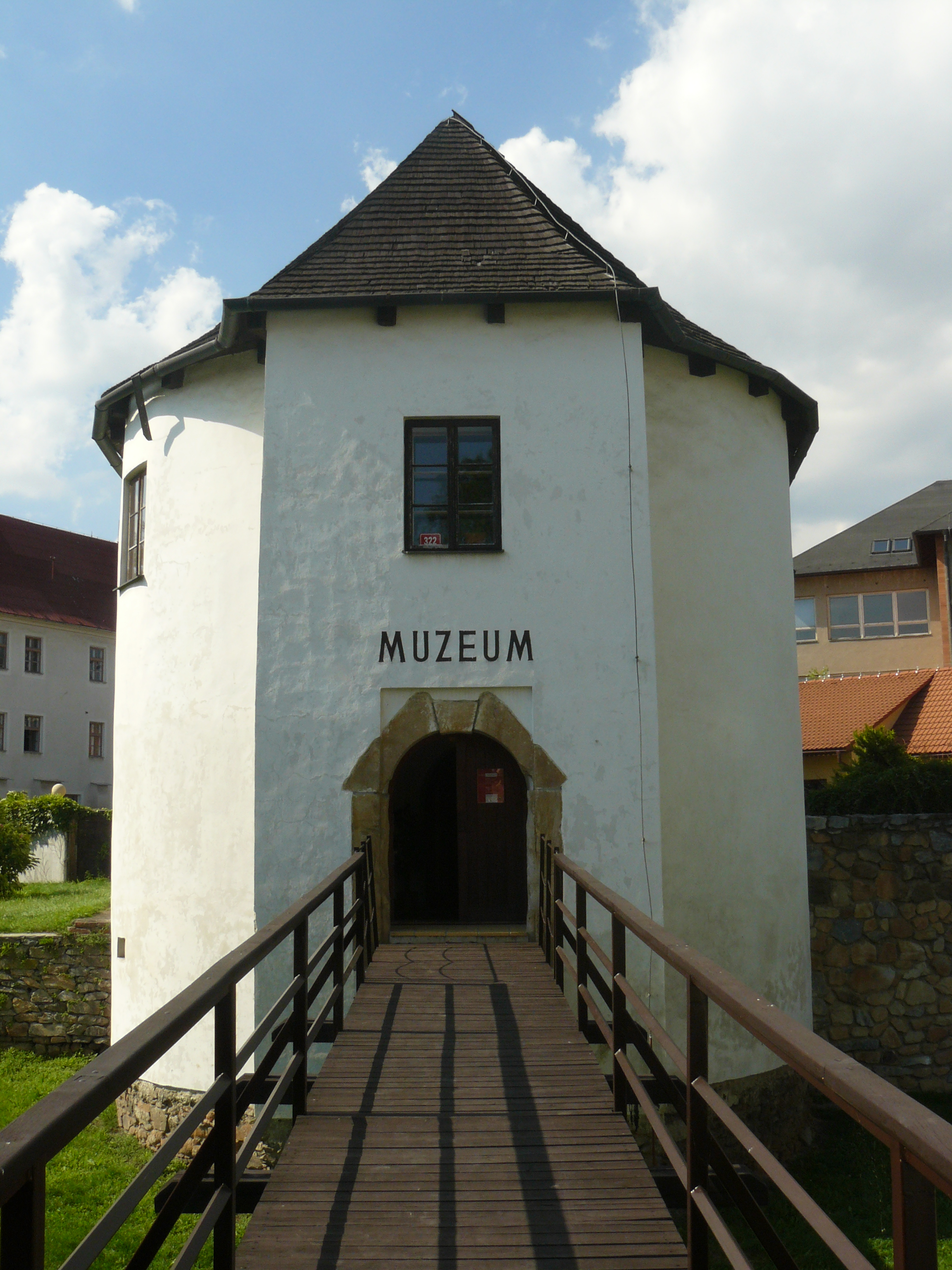 Městské opevnění - bašta Vodní branka (Uničov), Olomoucká ul. 322/23, Uničov